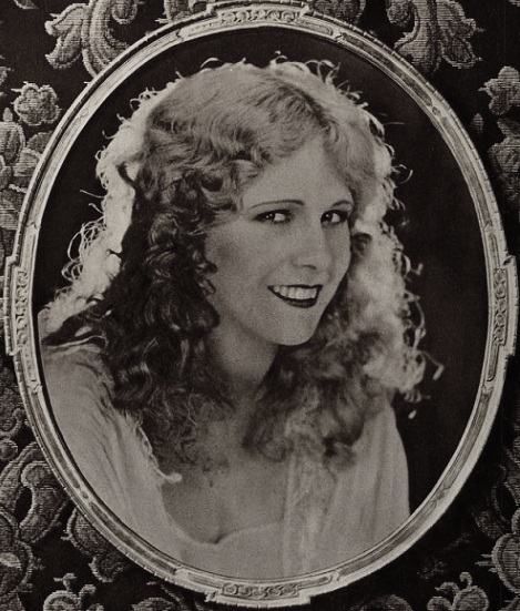 Betty Francisco